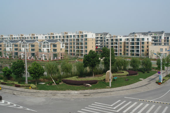 张浦蓝波湾小区